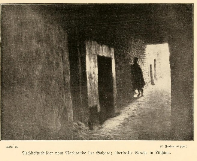 ((Commune de Bouchagroun) / Wilaya de Biskra) “Straßenzug in der Oase Lichana/Litchina am Rande der Sahara” - from Expeditionsbericht der Zweiten Deutschen Inner-Afrika-Expedition (1907-09) Auf dem wege nach Atlantis.